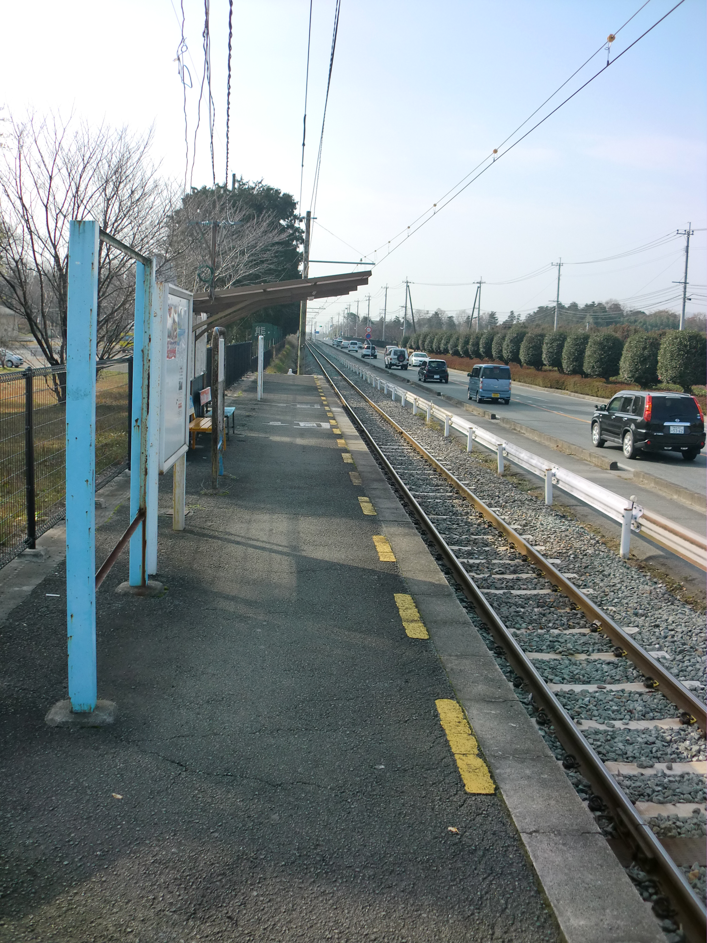 熊本電鉄再春荘前（さいしゅんそうまえ）駅ホーム